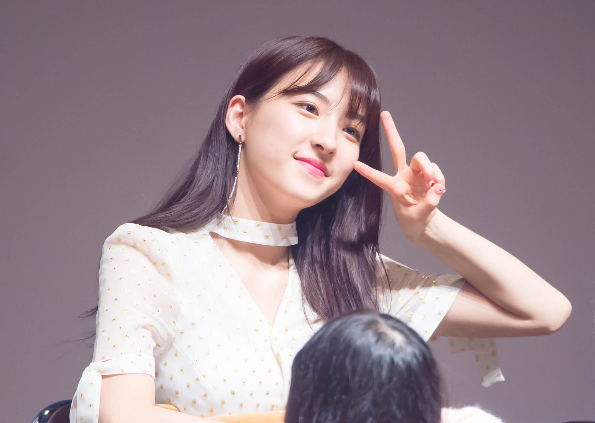 170107 명동팬싸인회 우주소녀 직찍